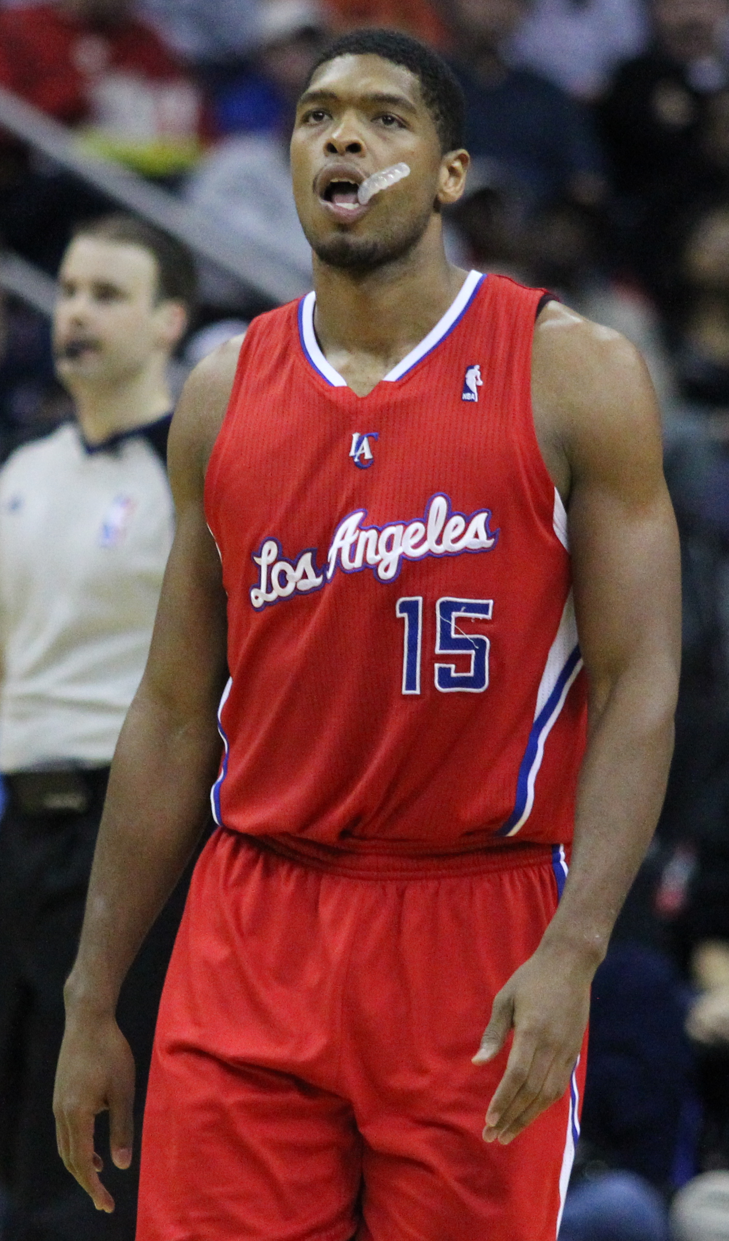 Wizards v/s Clippers 03/12/11